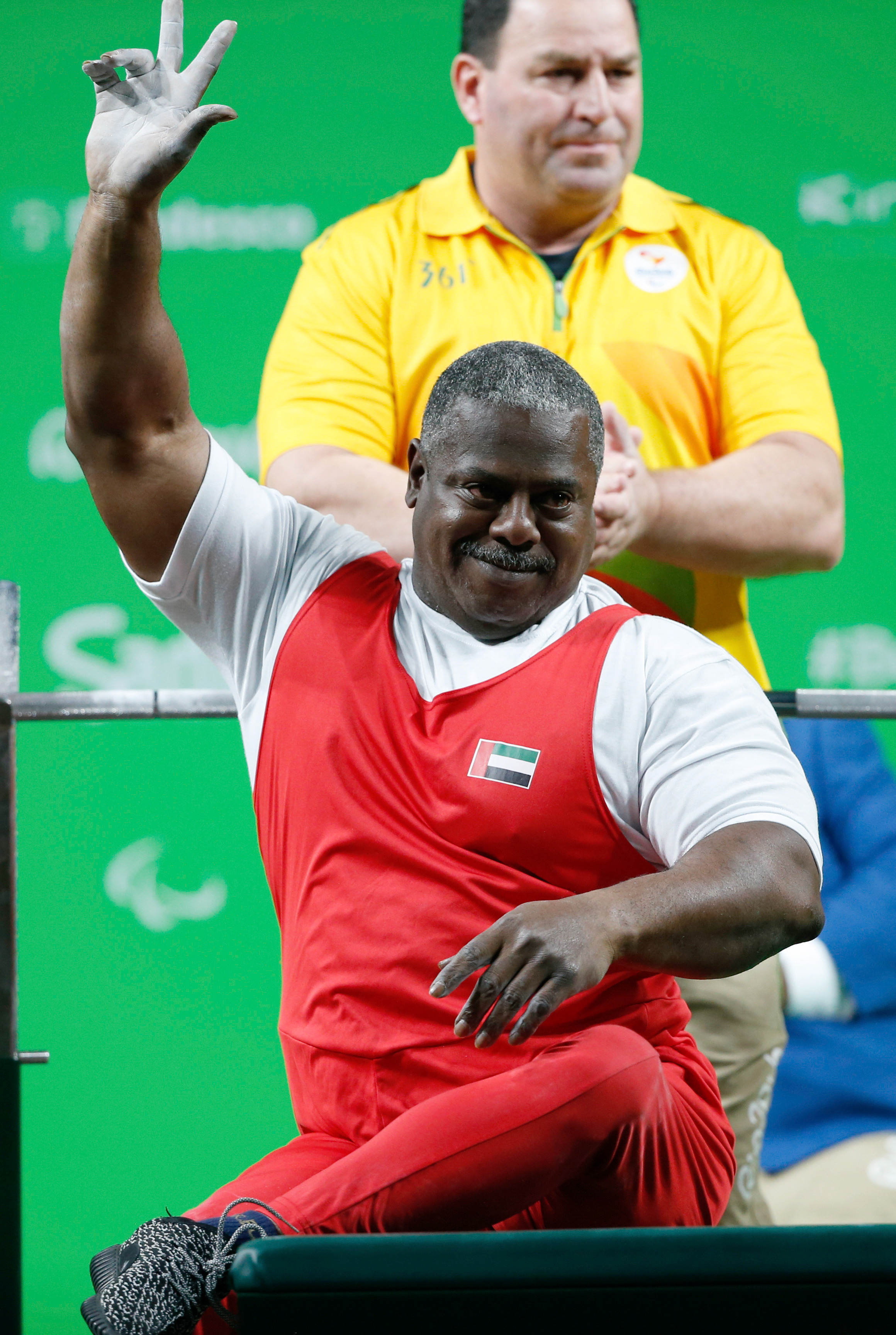 Rio de Janeiro - Mohammed Khalaf, dos Emirados Árabes, vence o levantamento de peso, categoria 88 kg, nos Jogos Paralímpicos Rio 2016